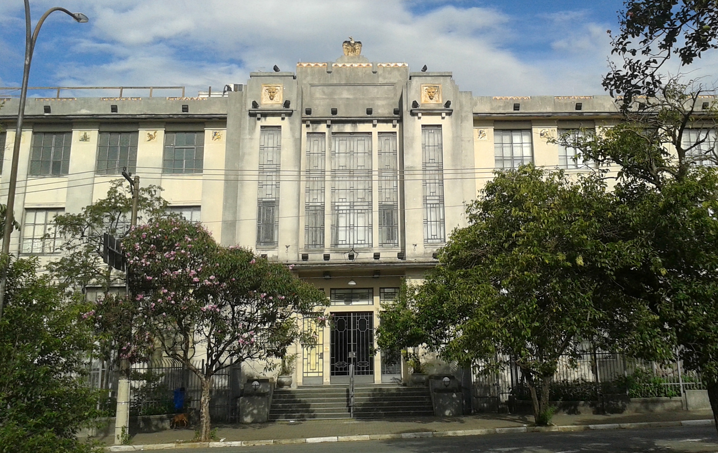 Vista parcial da fachada principal do Museu de Zoologia da USP, no Parque Independência, Ipiranga, São Paulo, SP, Brasil.